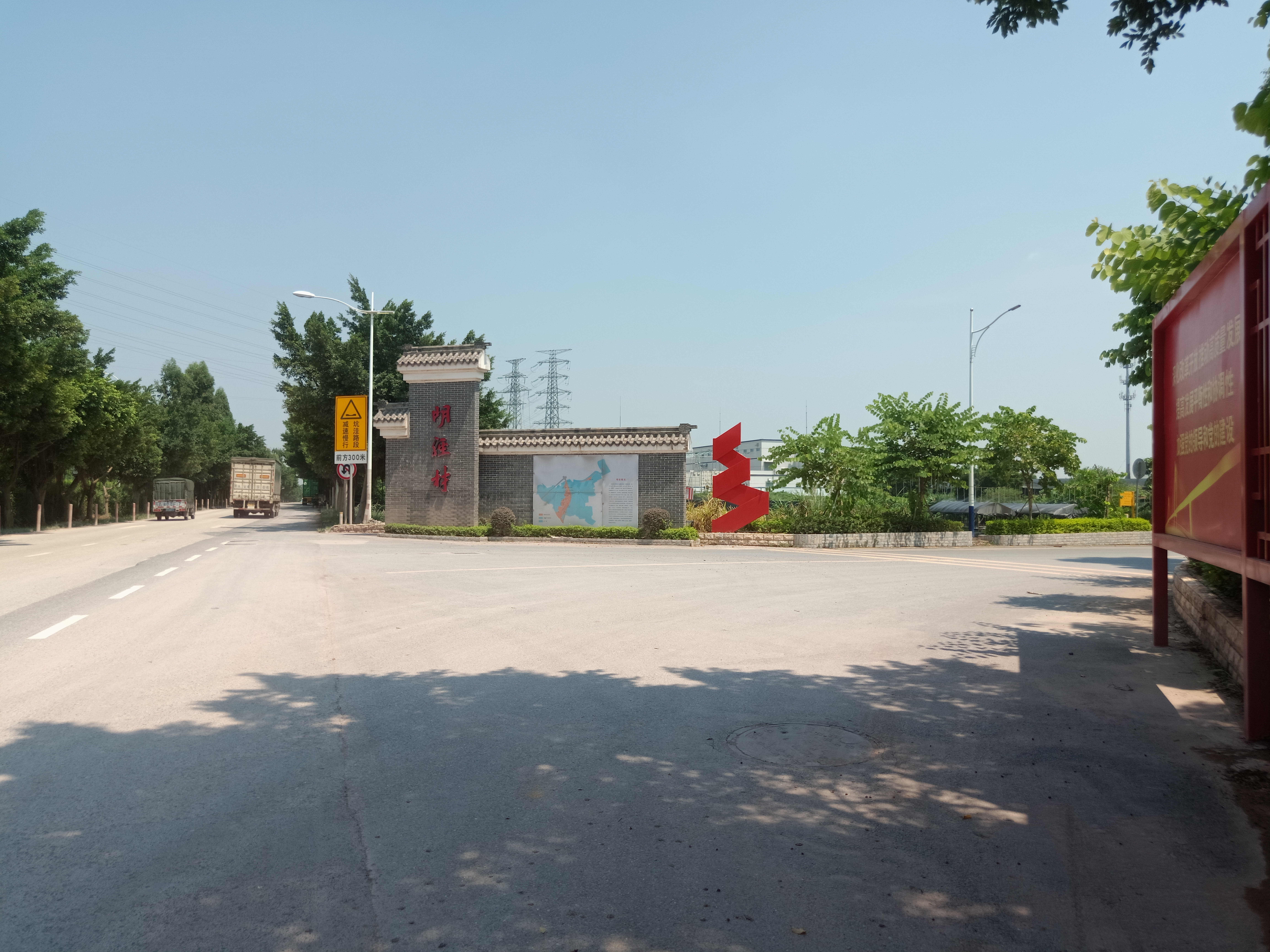 粵語: 喺中國廣東廣州番禺區化龍鎮明經村近茂德公草堂一角